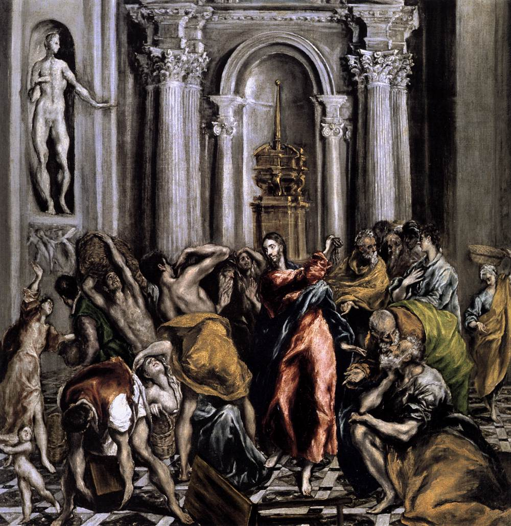 La obra representa el momento en que Jesucristo expulsó a los mercaderes del Templo de Jerusalén.